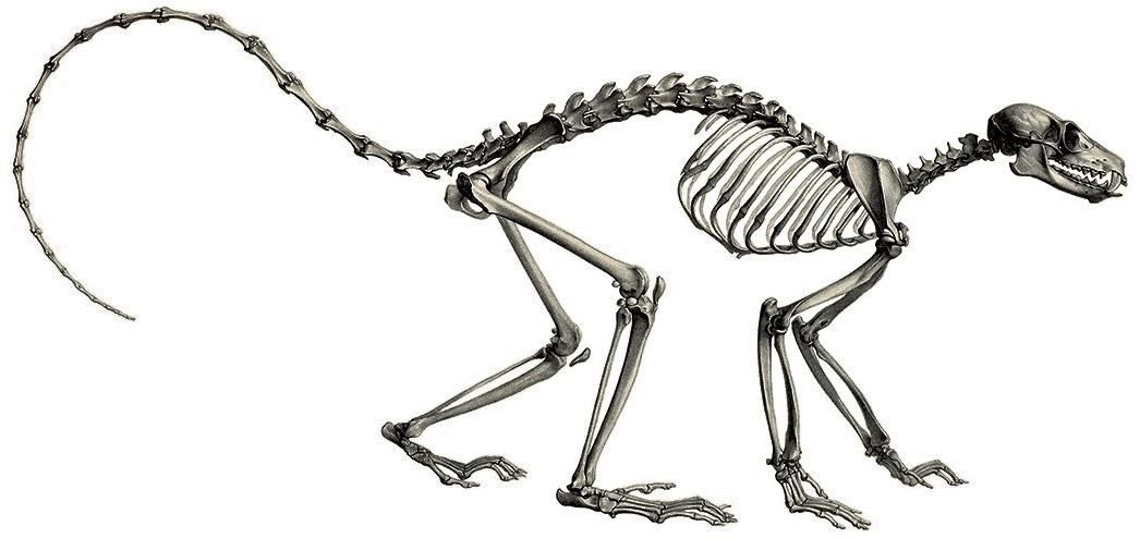 Black lemur skeleton